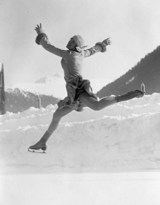 Schönheit und Grazie im Eiskunstlauf ! Die schöne Wiener Eiskunstlauf-Meisterin Frl. Hornung bei der Ausführung eines graziösen Eis-Sprunges.